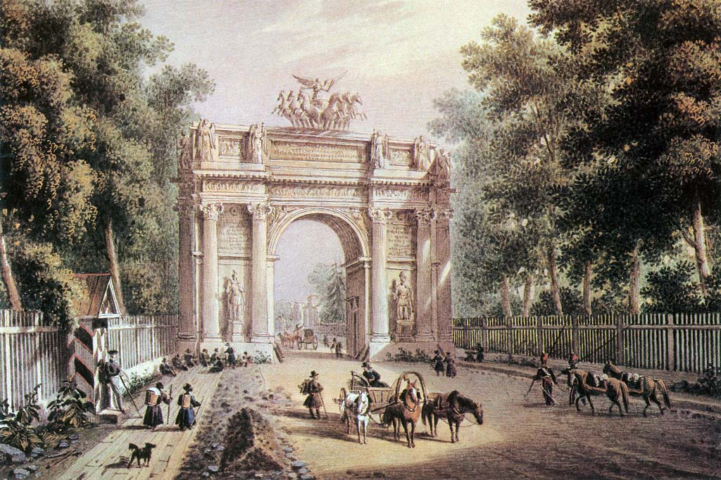 "Триумфальные ворота" Акварель К.П.Беггрова с его же литографии по рисунку К.Ф.Сабата и С.П.Шифляра. 1820-е гг.